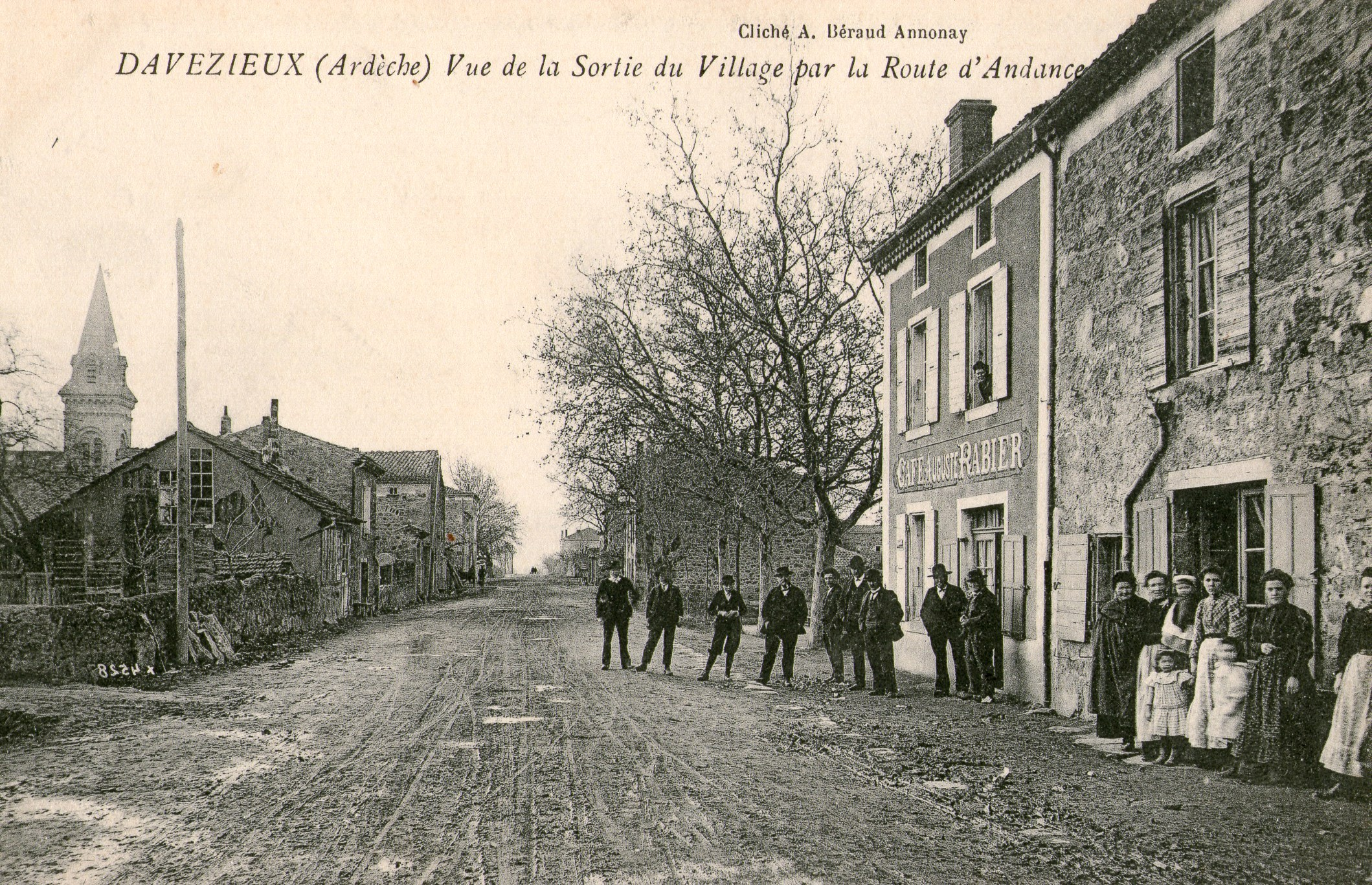 Davézieux rue principale